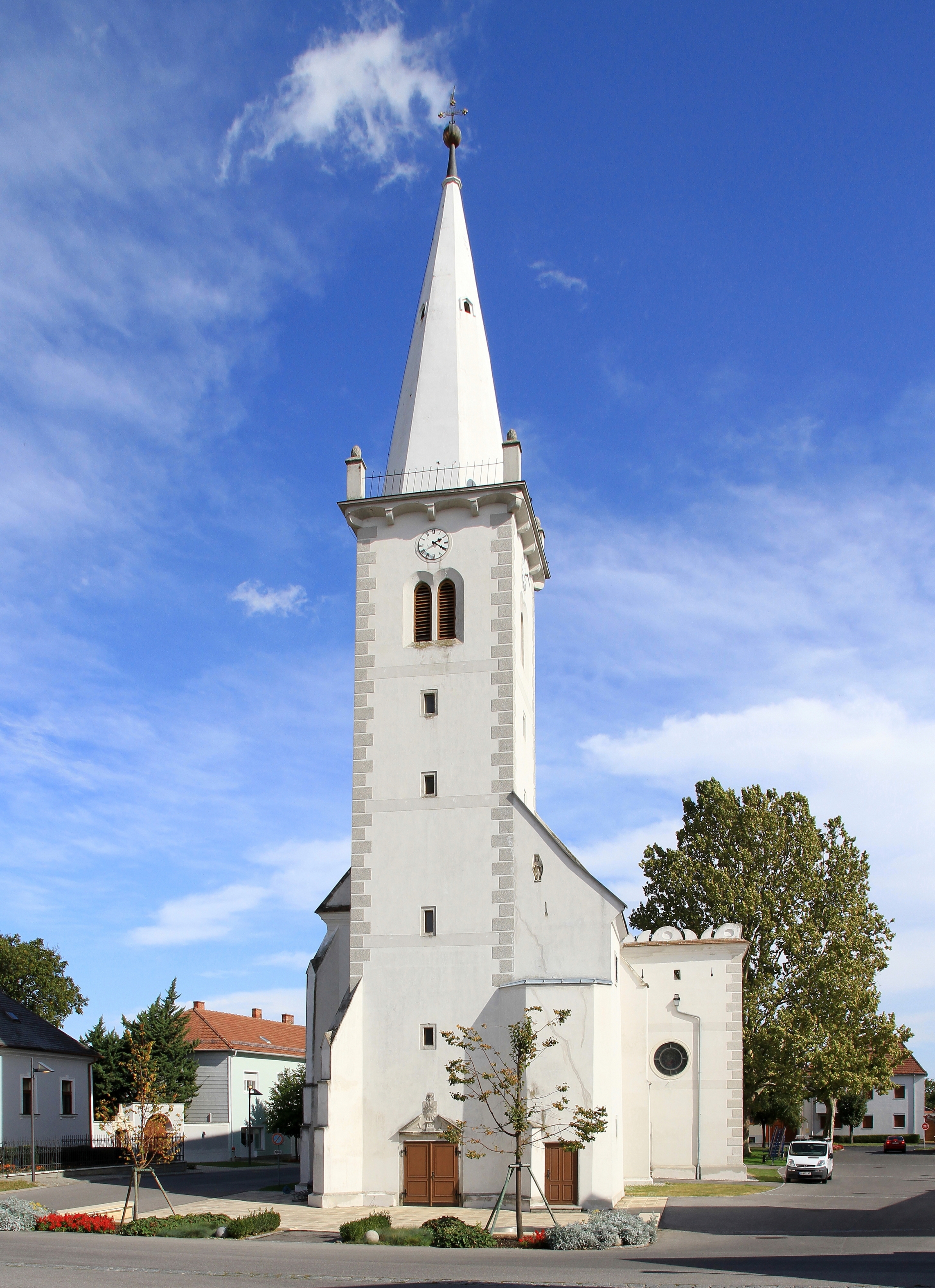 Katholische Pfarrkirche hl. Geist in der burgenländischen Marktgemeinde Neckenmarkt. Ursprünglich eine Wehrkirche, die 1642 barockisiert wurde, mit vorgestelltem viergeschossigen Westturm, der im Kern mittelalterlich ist.